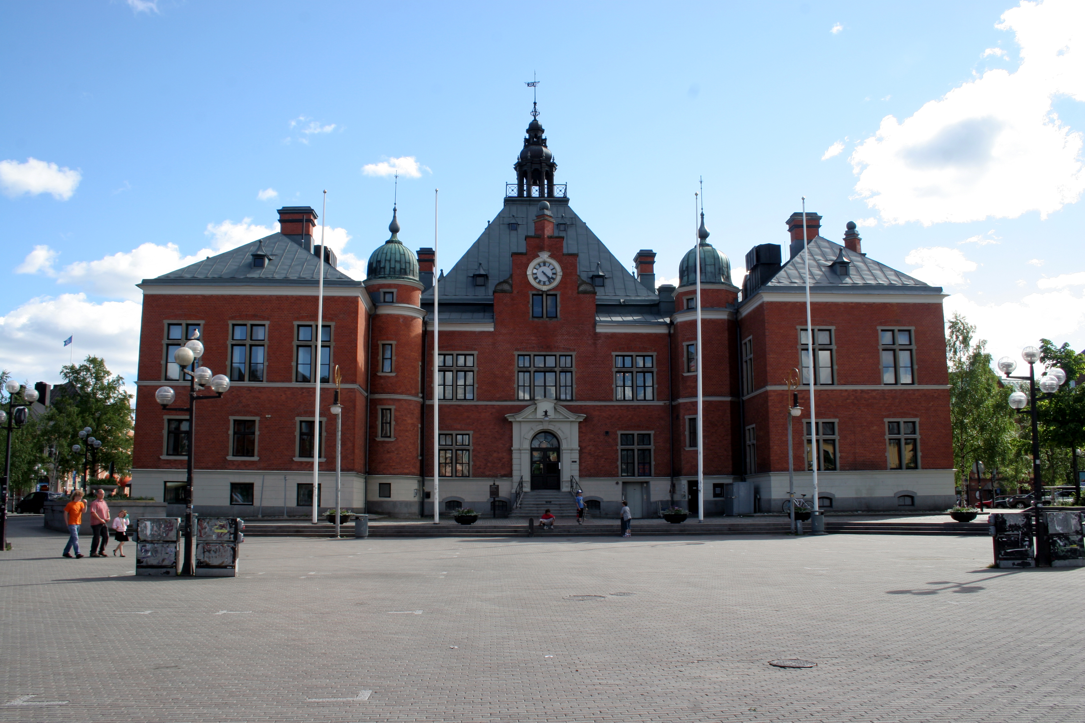 Umeå rådhus viewed from north.